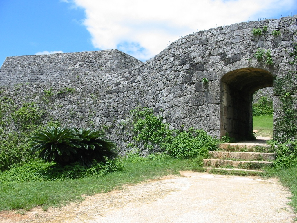 At Zakimi-jo castle site